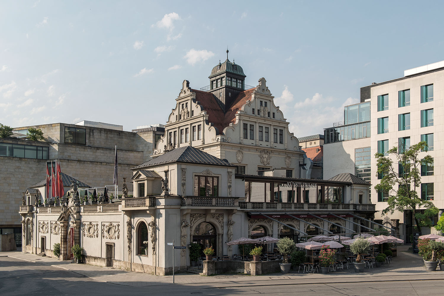 Münchner Künstlerhaus am Lenbachplatz Foto: Rainer Spitzenberger, 2015